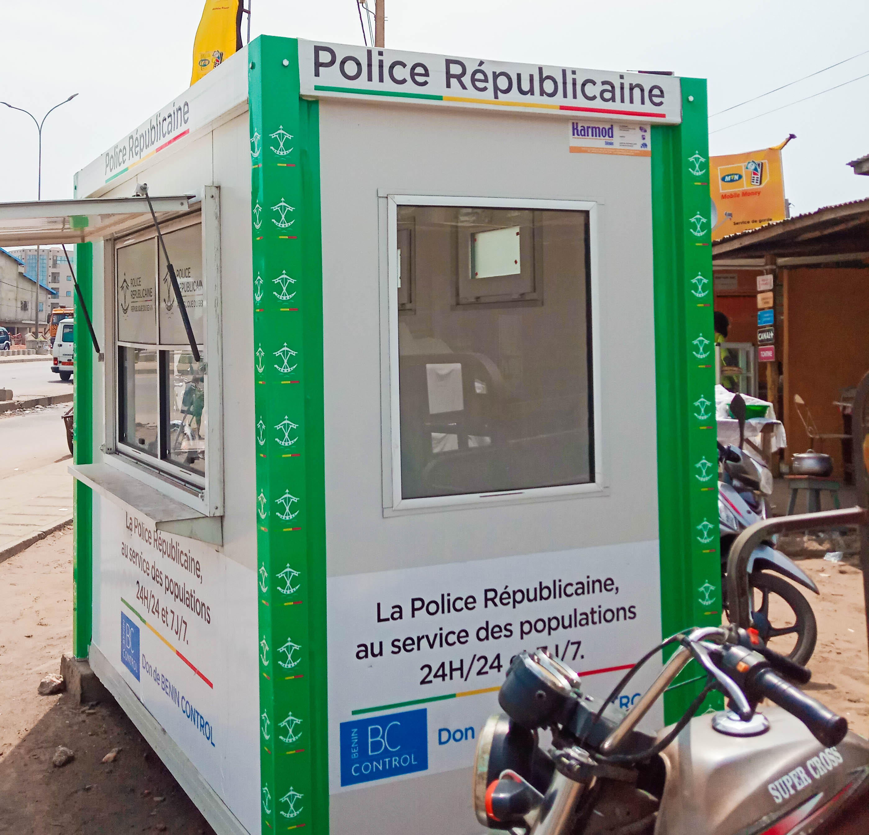 (Bénin) Une Cabine de la Police Republicaine.